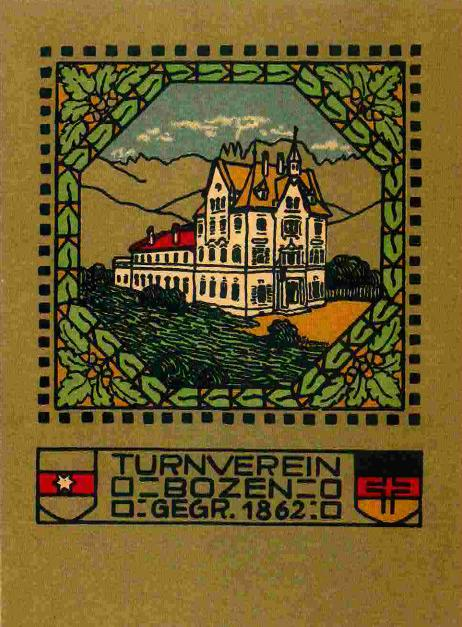 Vorderseite des Mitgliedsausweises des Turnvereins Bozen